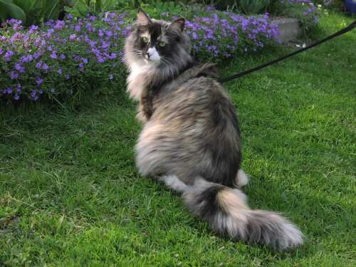 Kleo im Garten (NFO)